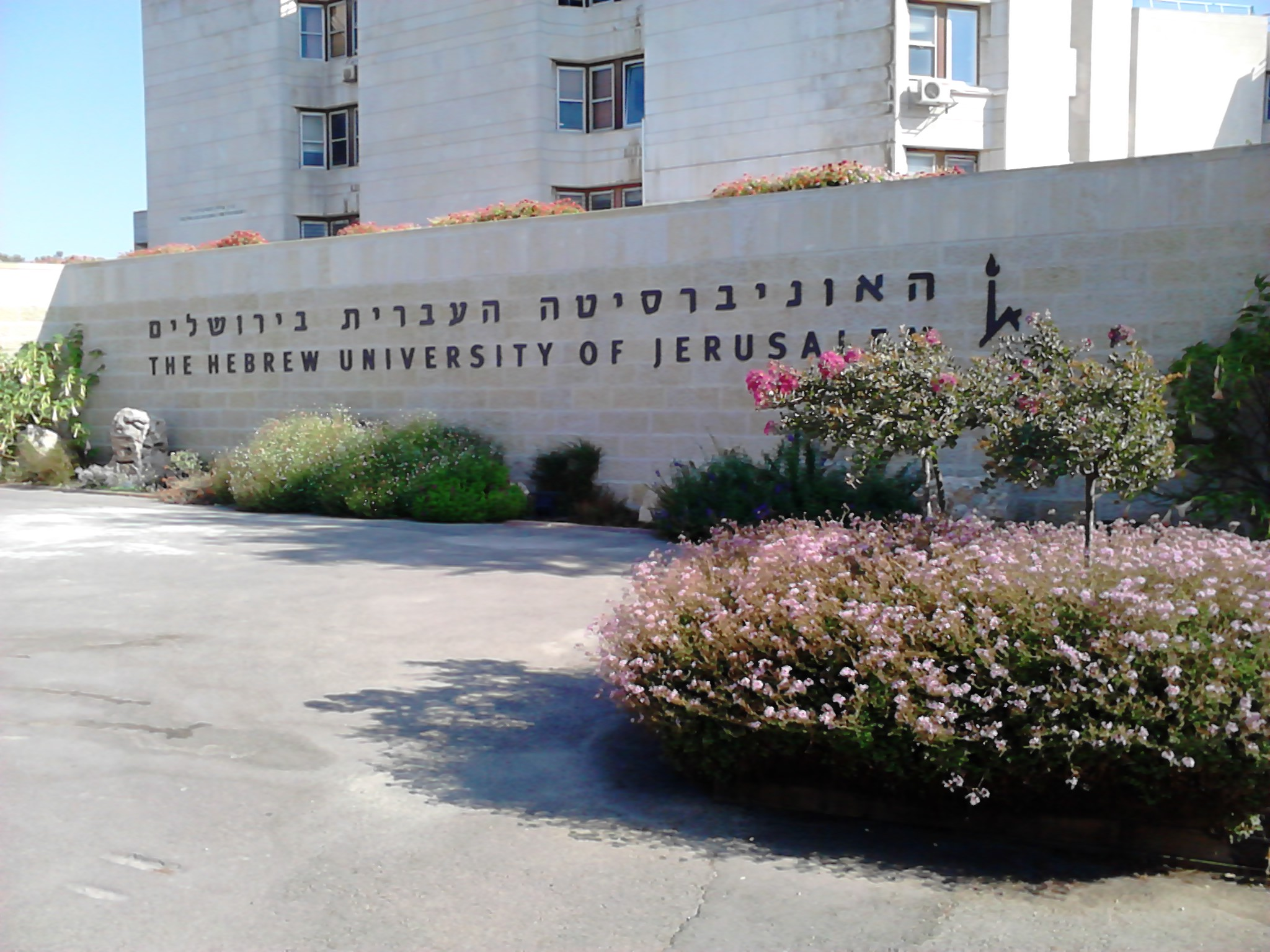 הכניסה הראשית לקמפוס הר הצופים באוניברסיטה העברית